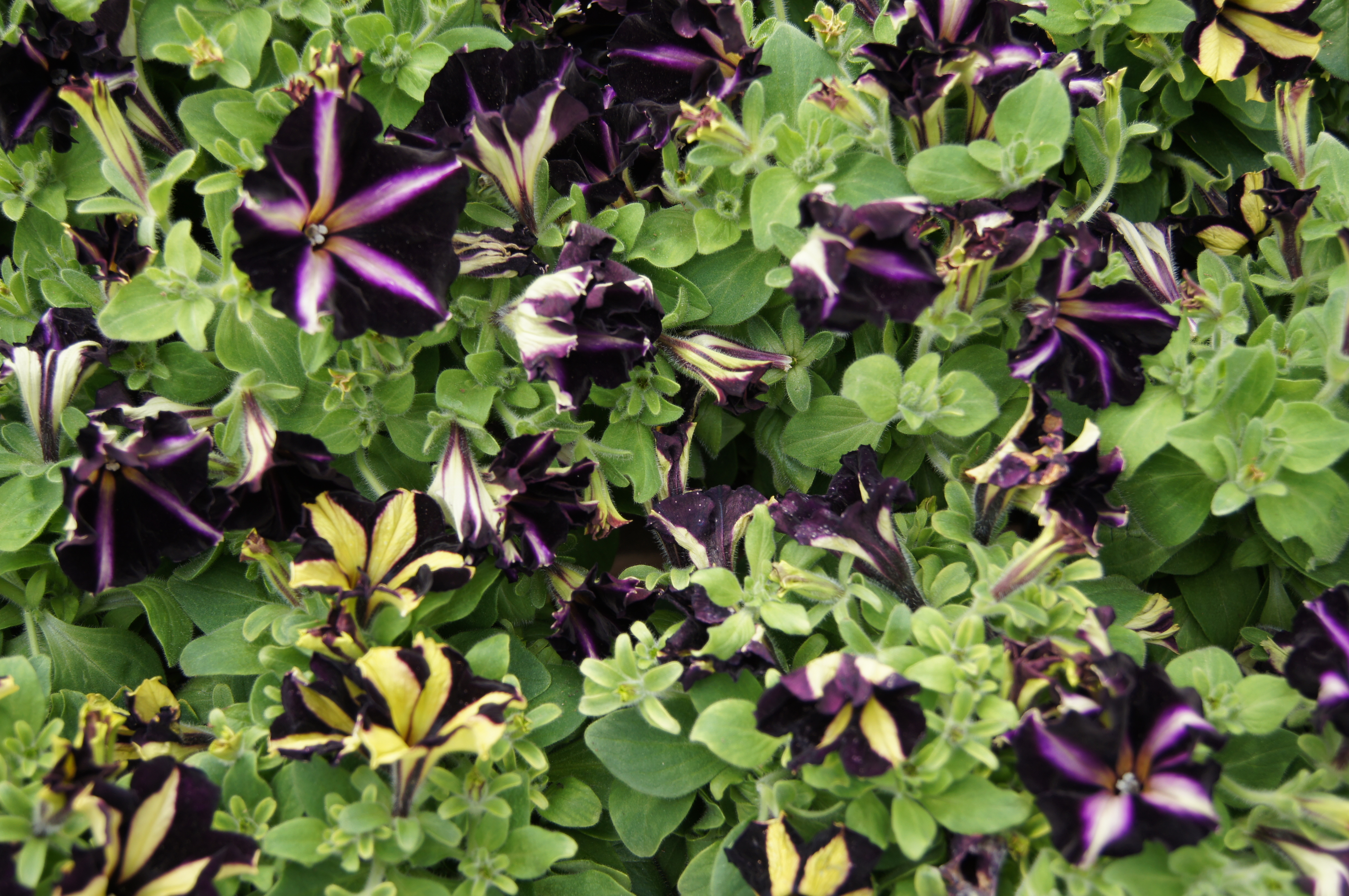 Petunien "Surfinia" bicolor Purple und Phantom